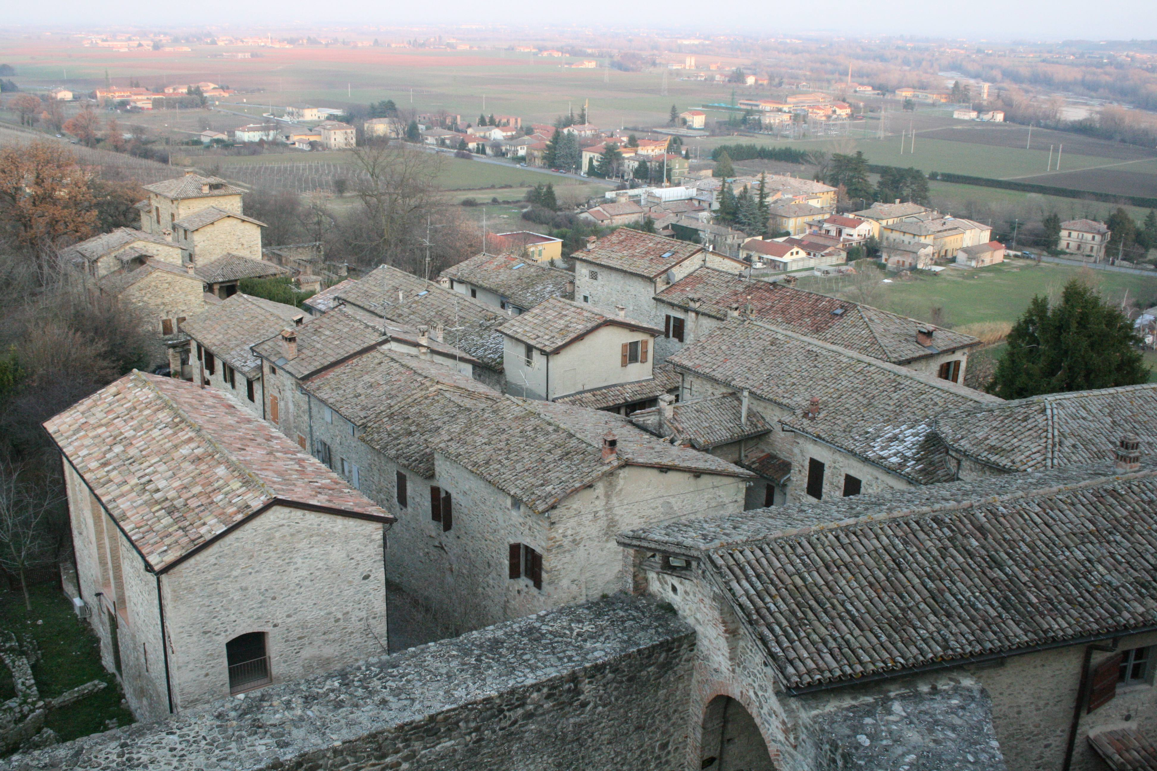 Borgo del castello di Torrechiara